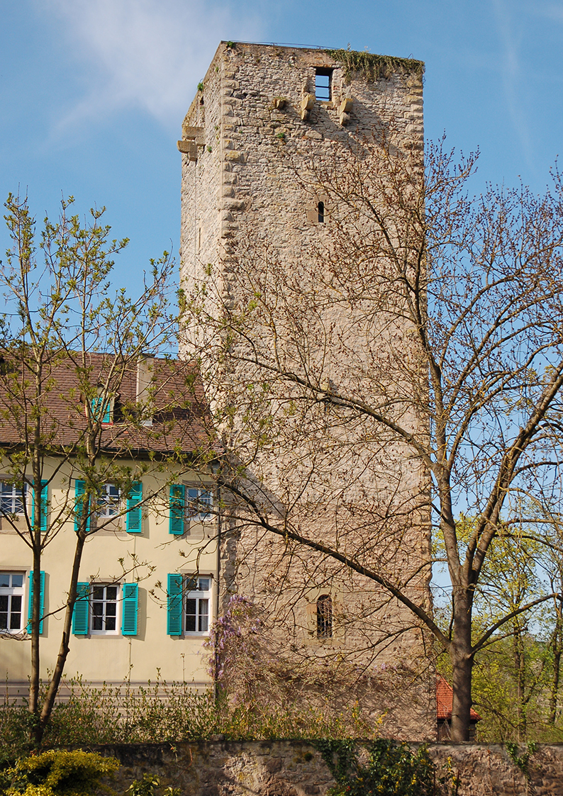 Burgfried am Schloss Unterriexingen (von Süden) mit stauferzeitlichen Buckelquadern